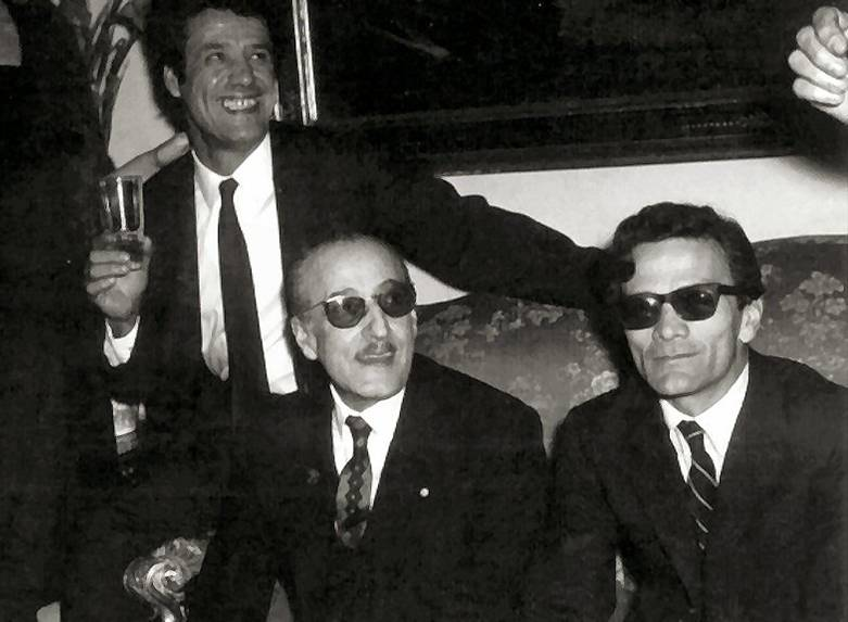 Presentazione del film Capriccio all'italiana